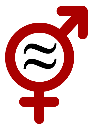 Parekidetasunaren ikurra. Symbol of parity.